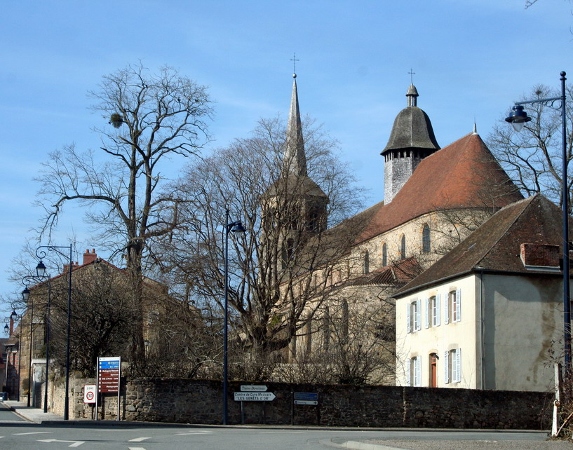 Église d'Evaux les bains et du presbitère